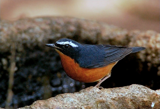 Indian Blue Robin Larvivora brunnea, male. Nandi Hills, Bangalore, India